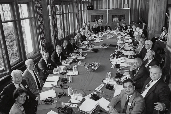 Première réunion de la Table ronde de Caux à Caux (Suisse) en 1986, avec notamment Frits Philips (Philips B.V.), Olivier Giscard d'Estaing (INSEAD) et Ruyzaburo Kaku (Canon).